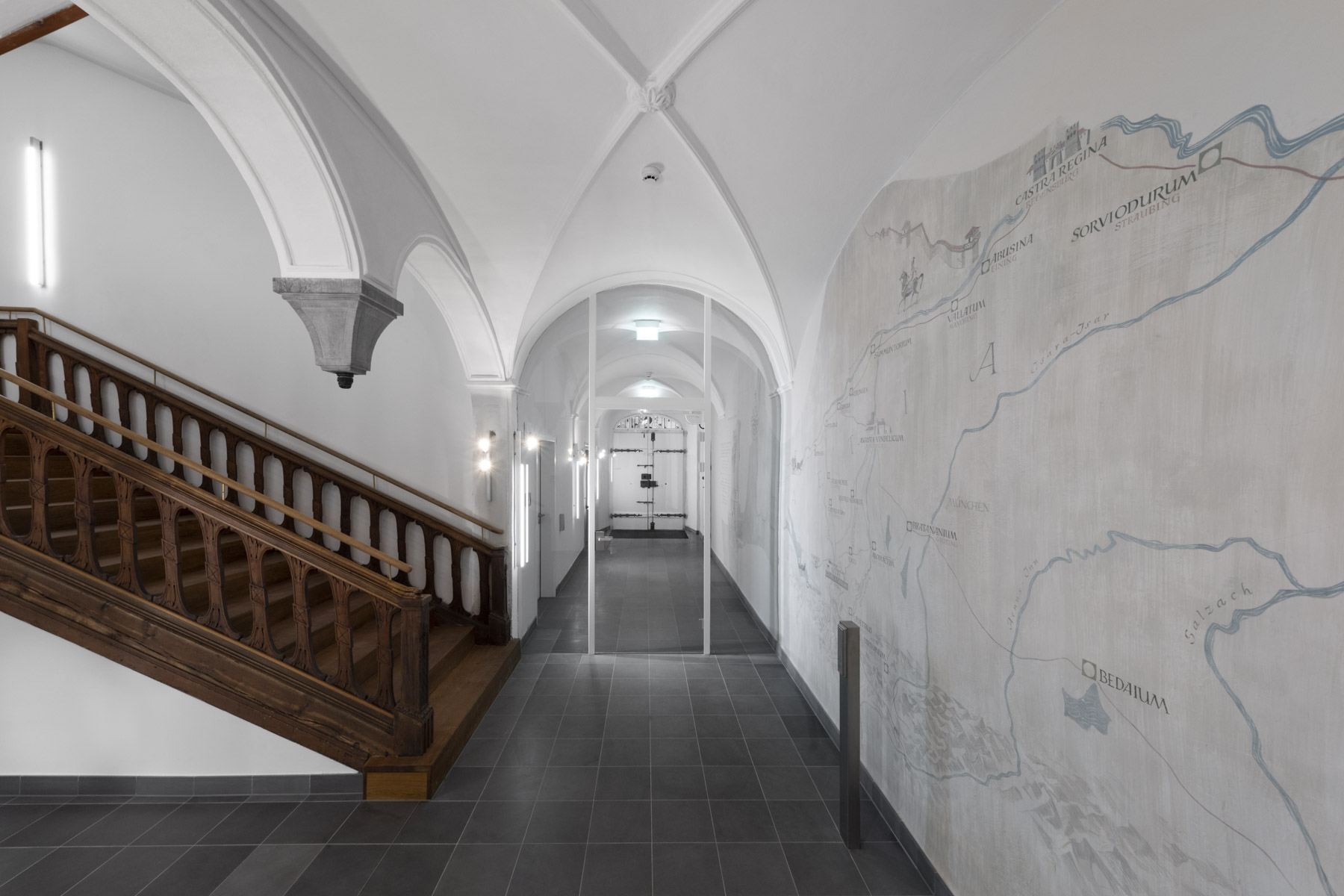 Blick in den Eingangsbereich des neuen Kempten-Museums im Zumsteinhaus. Rechts das Wandbild von Heinz Schubert von 1961 mit einer Karte der Römerstraßen.